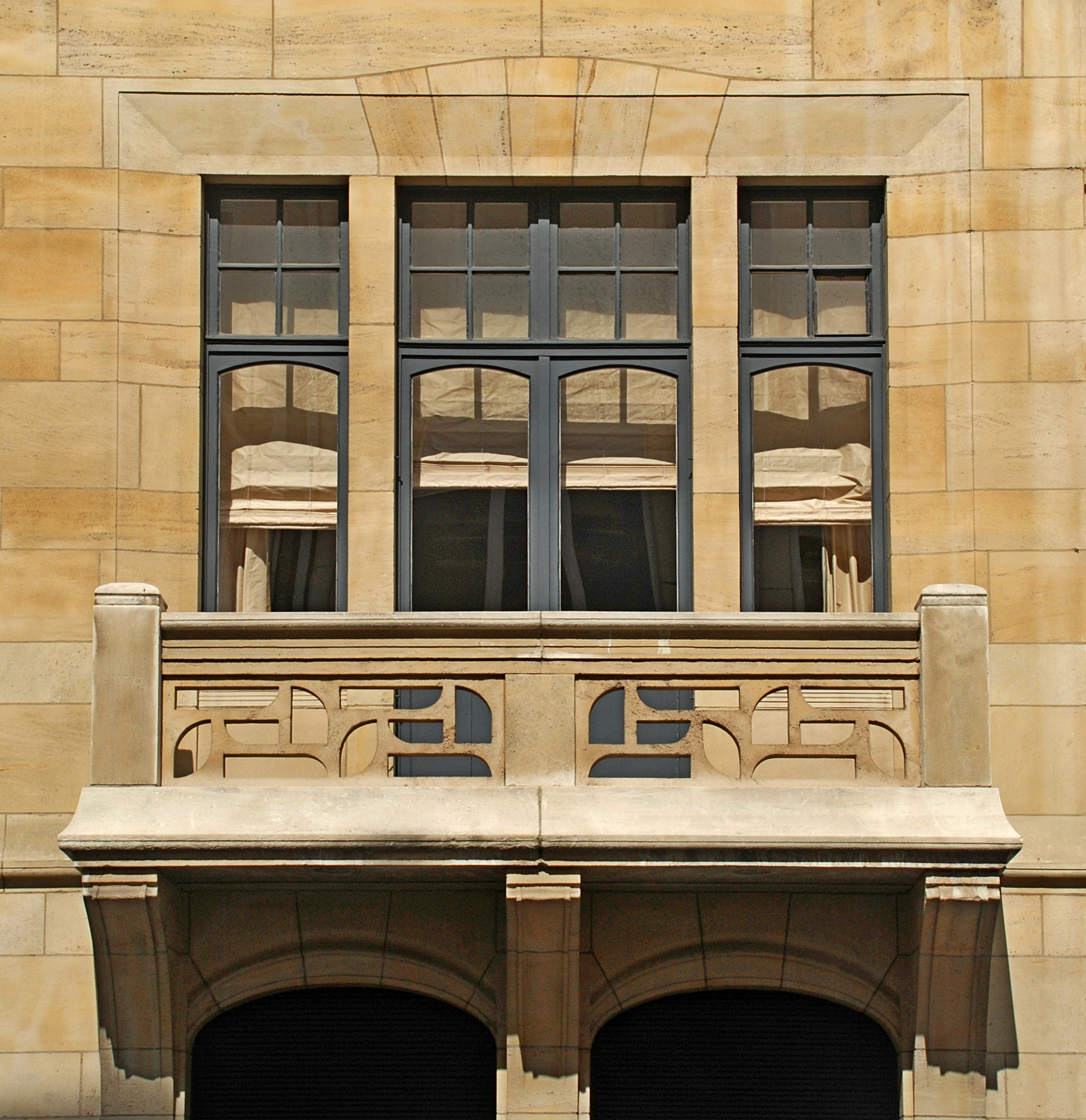 Belgique - Bruxelles - Hôtel De Brouckère